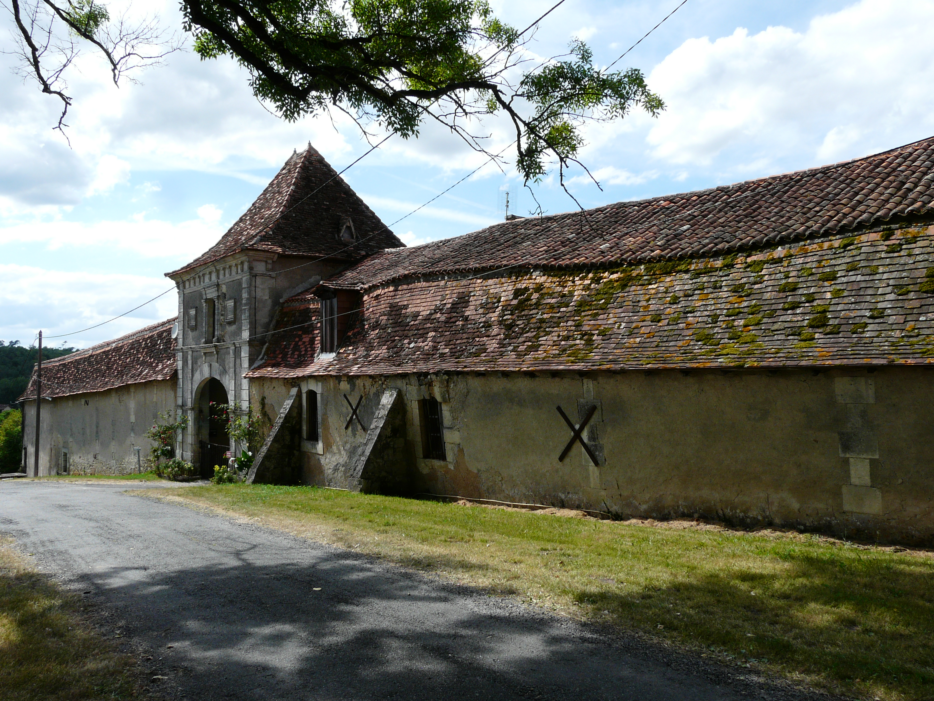 Château de Segonzac à Segonzac (Dordogne)